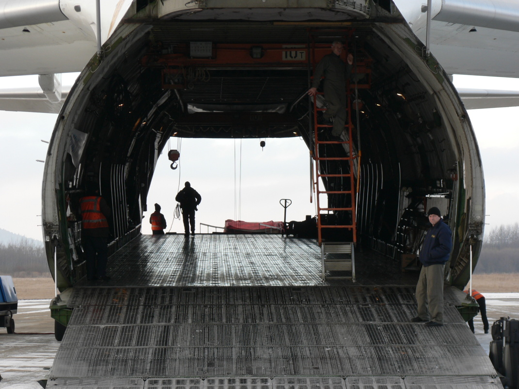 AN 124 - 100 Ruslan. Airport Poprad Tatry, Jedno z najväčších nákladných lietadiel na svete . Nákladný priestor